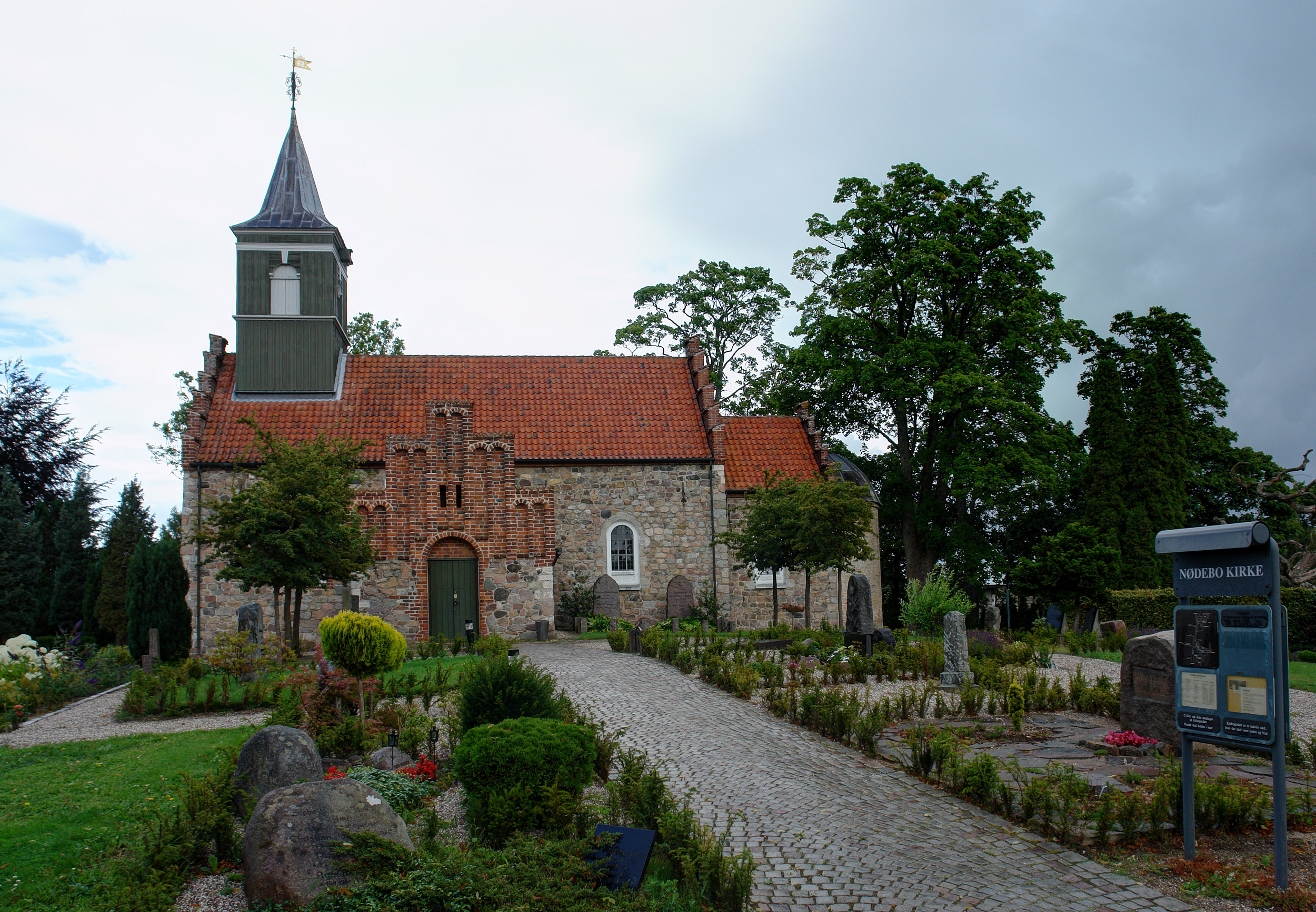 Kirche von Nødebo, Dänemark (Nord-Seeland).